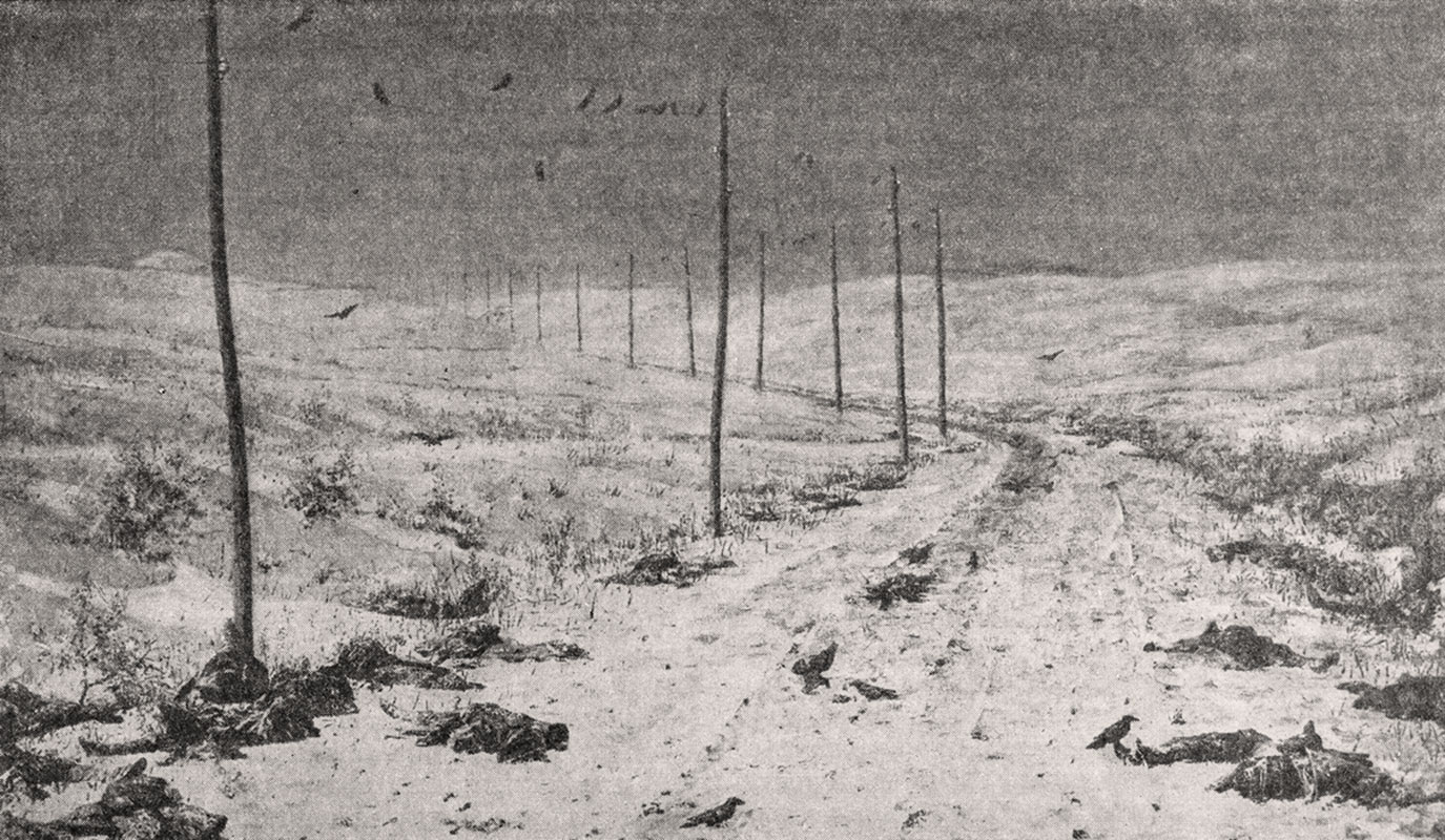 Картината «Пленные» («Дорога от Плевны») В.Верещагин